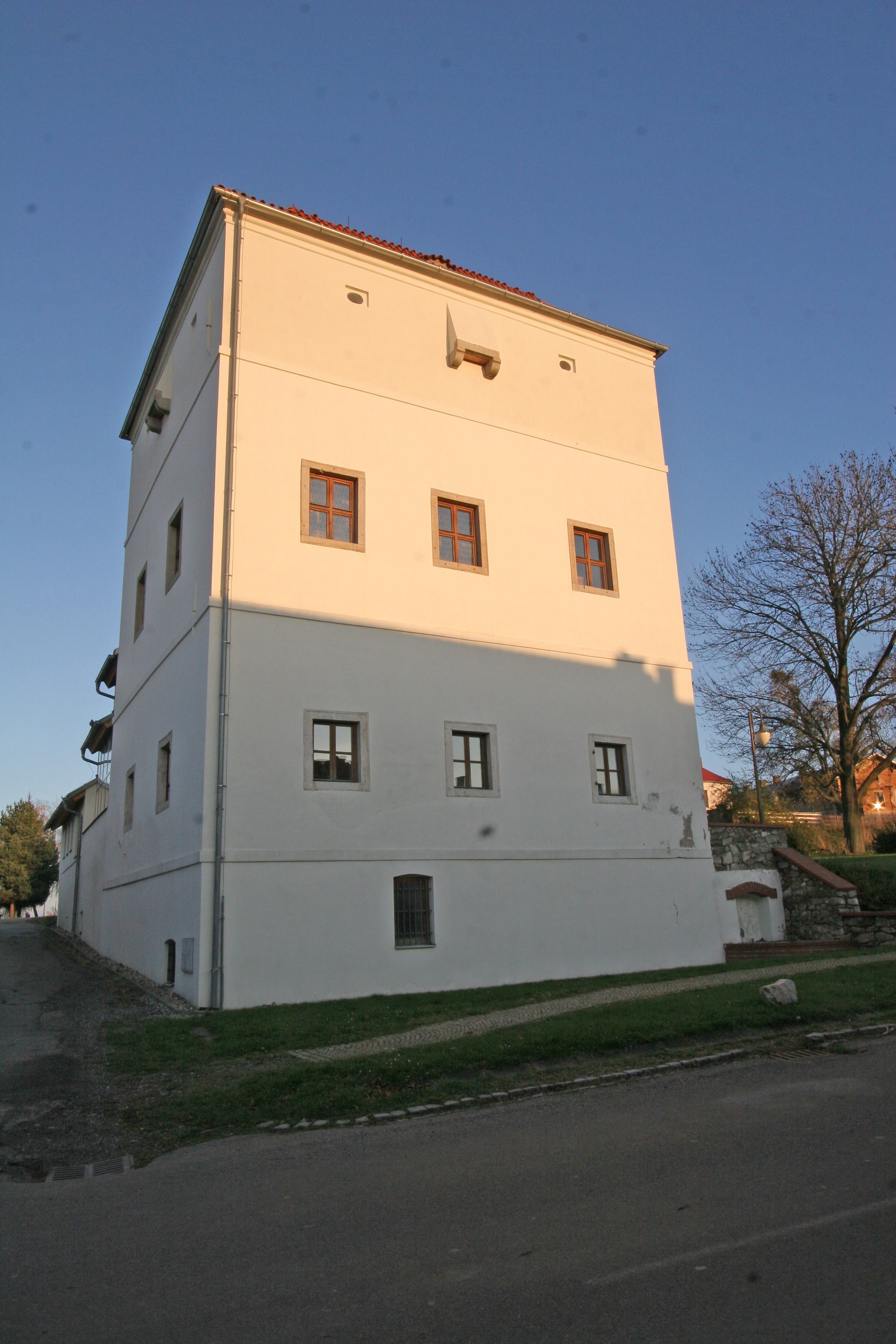 Tvrz (Golčův Jeníkov), 5. května 8, Golčův Jeníkov